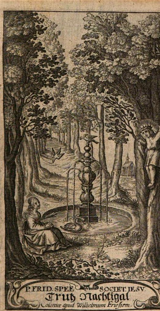 Titelkupfer